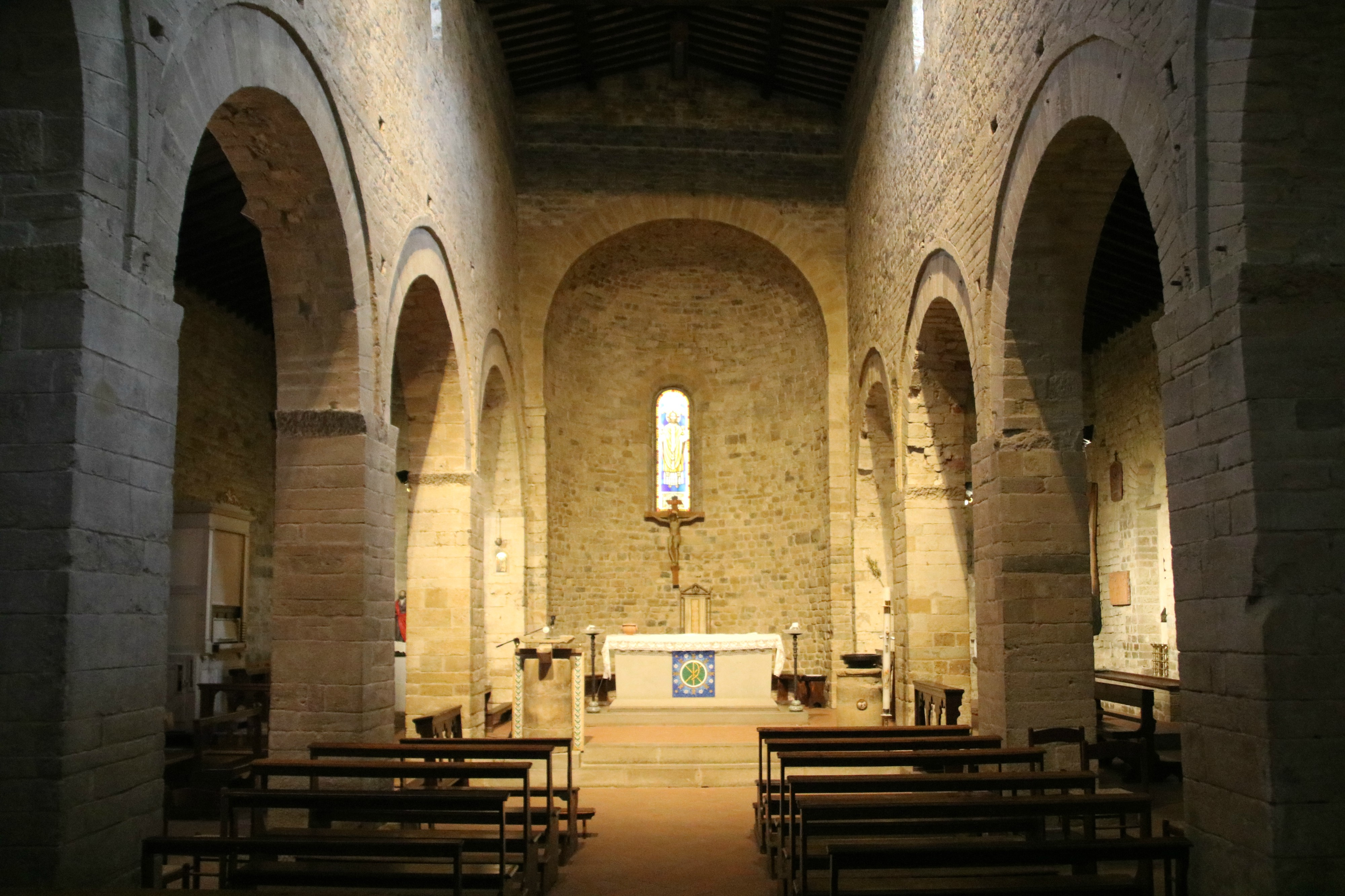 Pieve di San Pietro in Bossolo (Tavarnelle Val di Pesa)